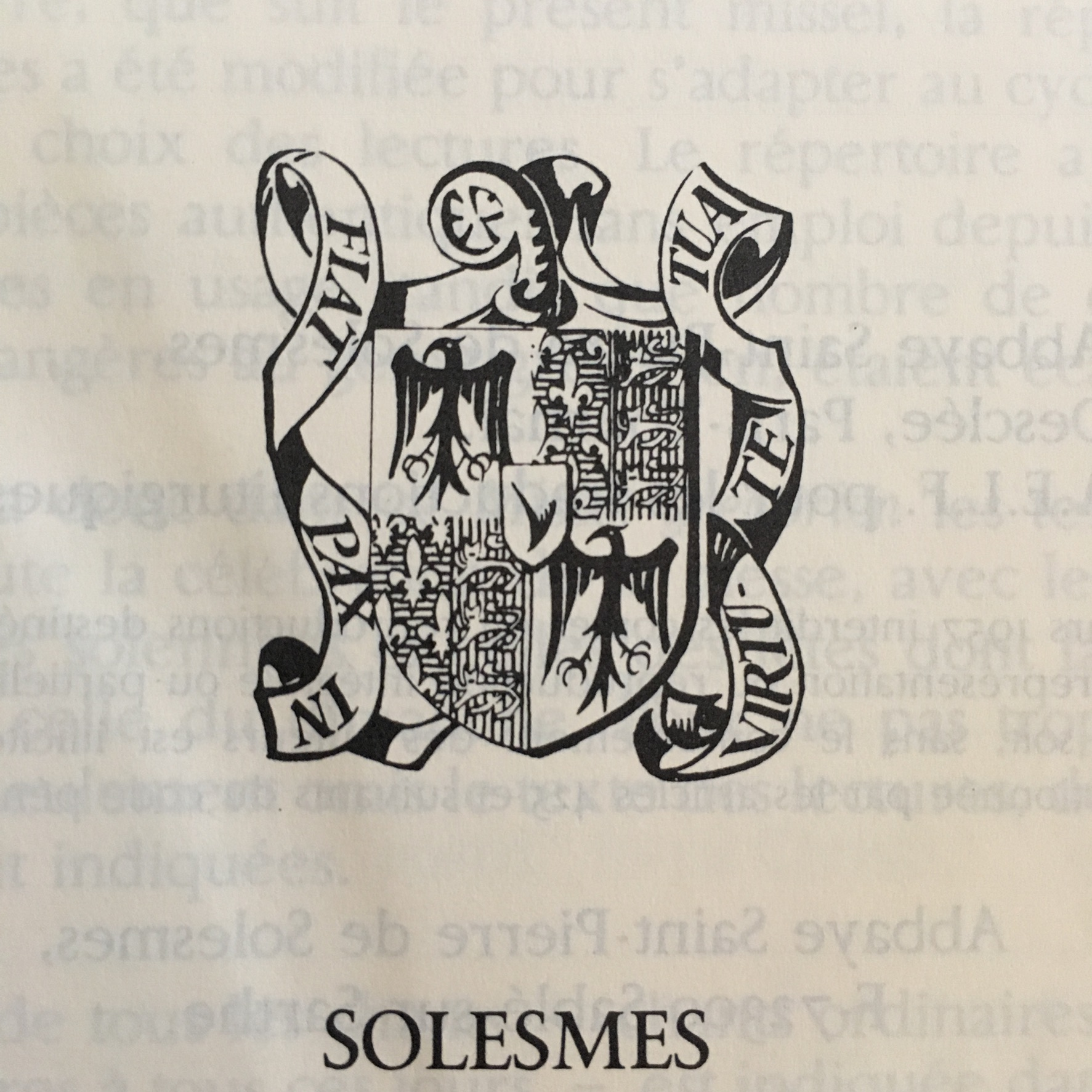 Armoiries de l'abbaye Saint-Pierre de Solesmes. L'abbaye de Solesmes porte : Ecartelé : aux 1 et 4, parti a. d'azur semé de fleurs de lys d'or b. de gueules à trois léopard d'or qui est l'abbaye de La Couture ; aux 2 et 3, d'or à l'aigle d'azur qui est Sablé ; sur le tout d'argent à une épine au naturel.